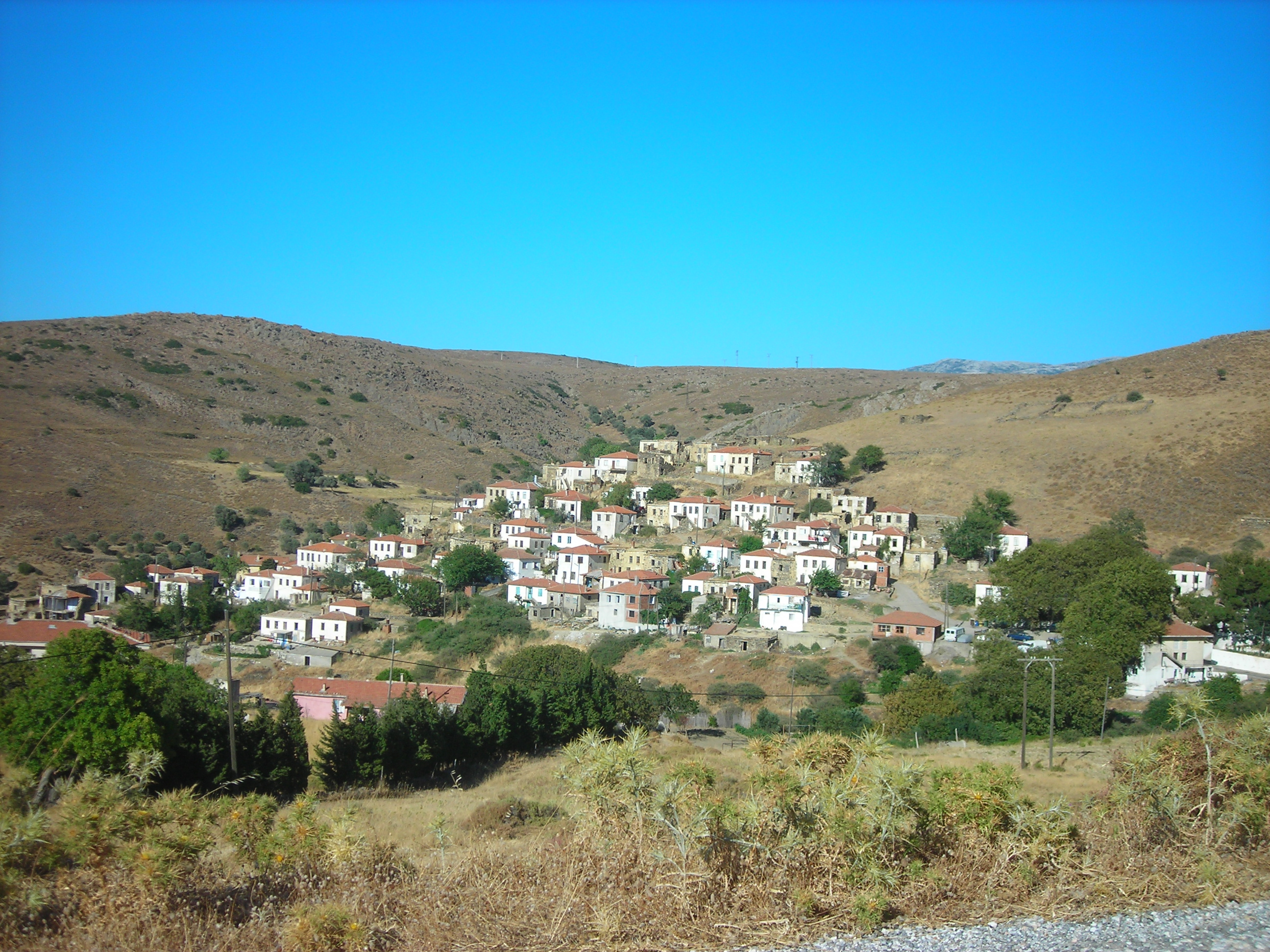 Küçükbahçe köyü, Karaburun